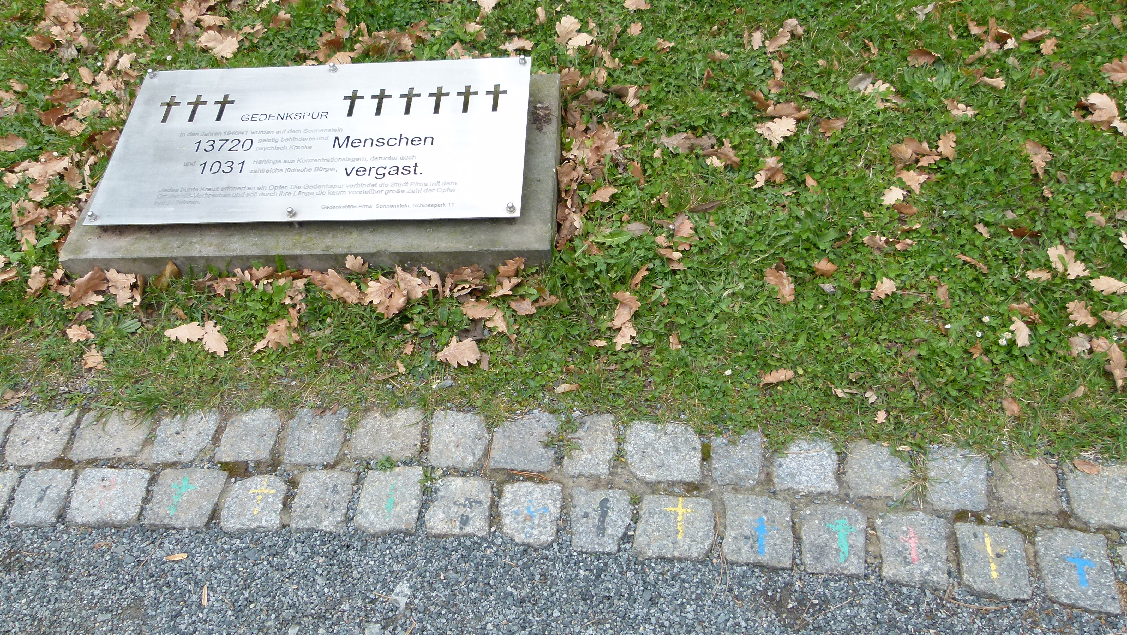 Informationstafel zur Gedenkspur mit bunten Kreuzen für die in Pirna-Sonnenstein ermordeten Menschen